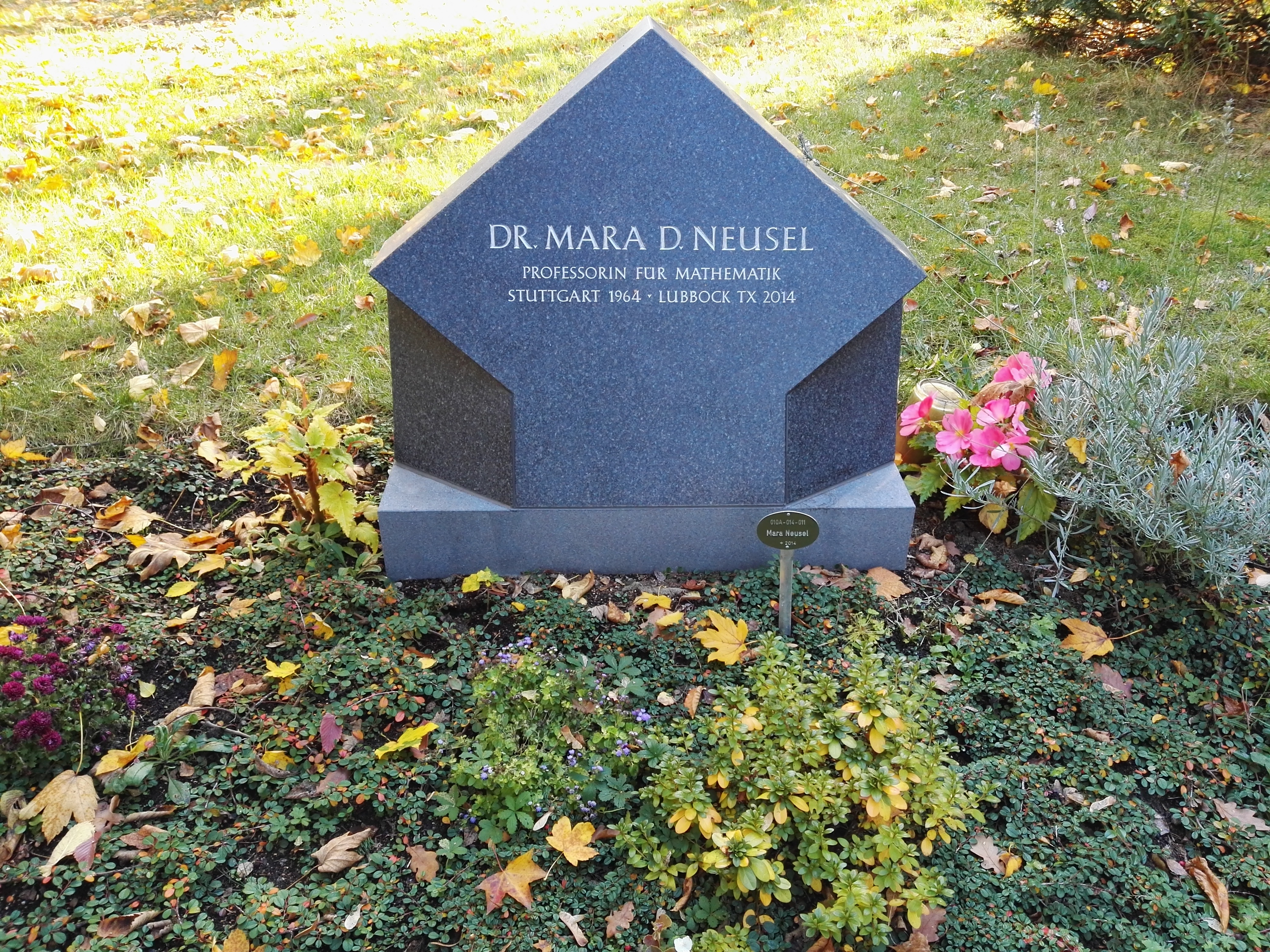 Grab von Prof. Mara D. Neusel auf dem Luisenstädtischen Friedhof in Berlin-Kreuzberg